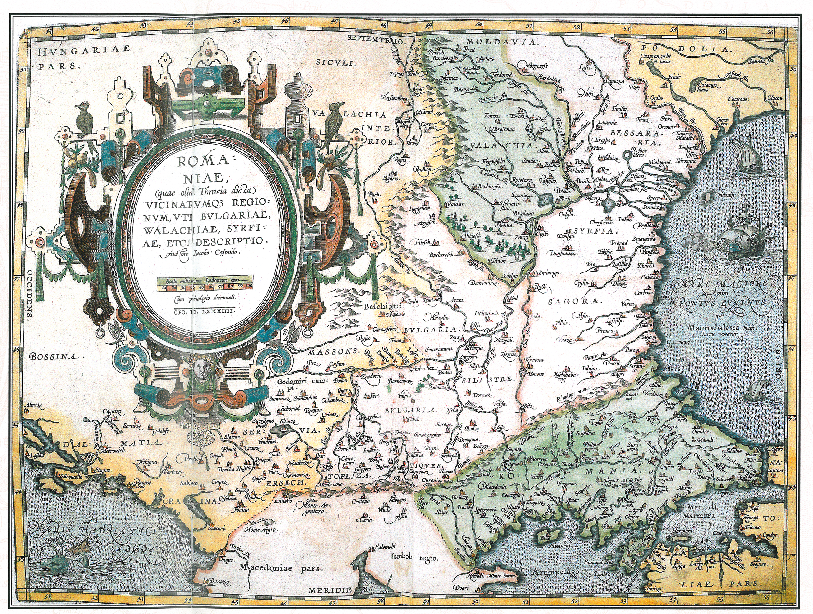 Romania (Румелия), бывшая Фракия; с окружающими странами Болгария, Валахия, Сирфия (Сербия). Голландская карта ru:1602 года (Антверпен).